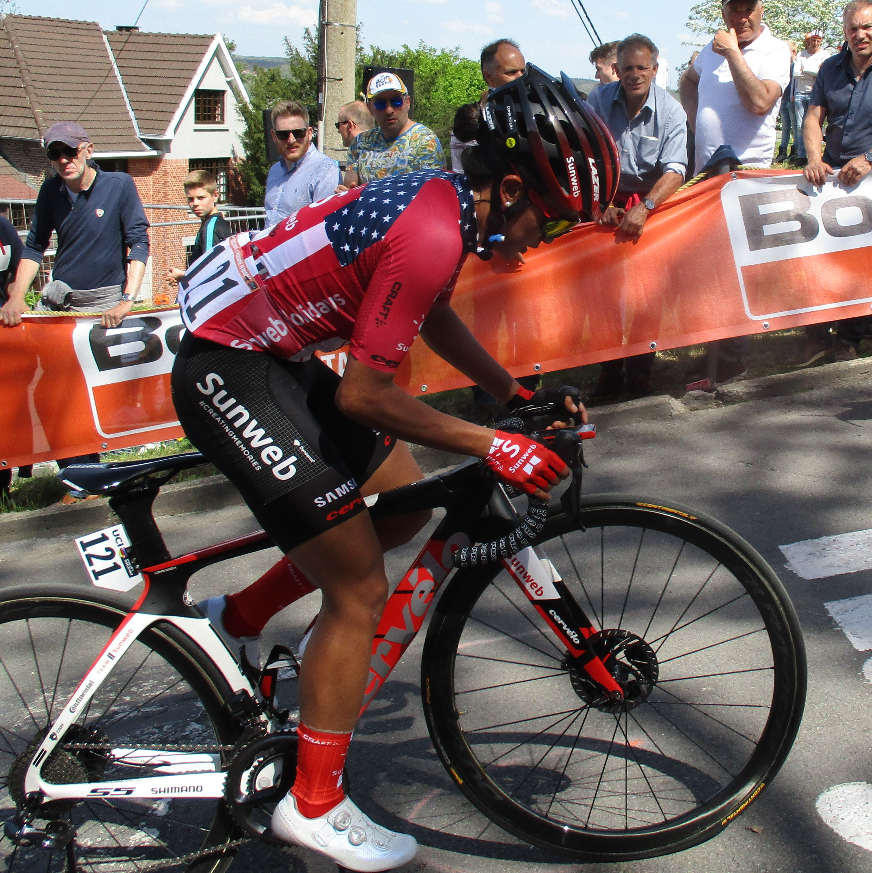 Eerste passage van de Waalse Pijl 2019 voor vrouwen op de Mur de Huy